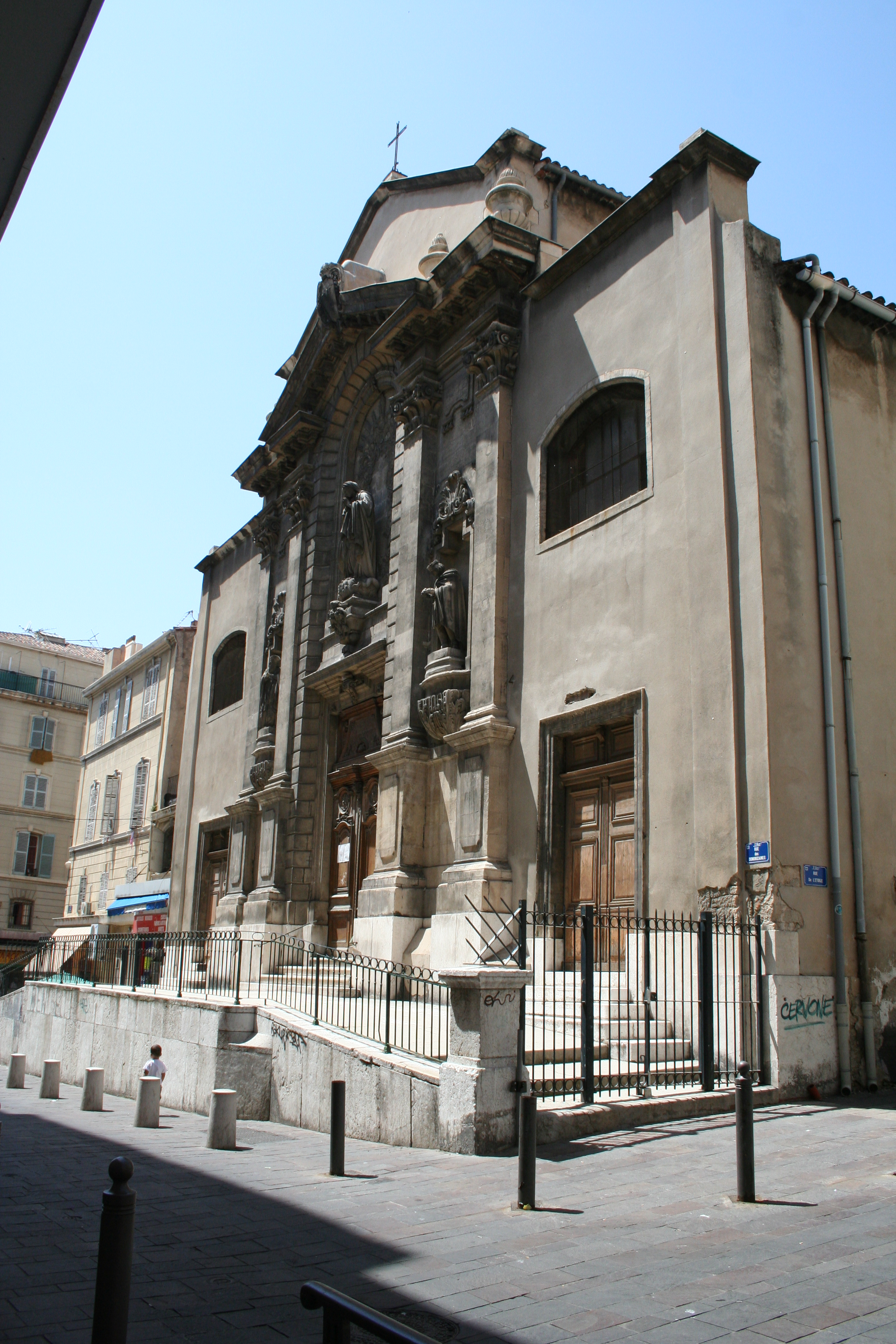 église Saint Théodore à Marseille, classée monuments historiqu;e